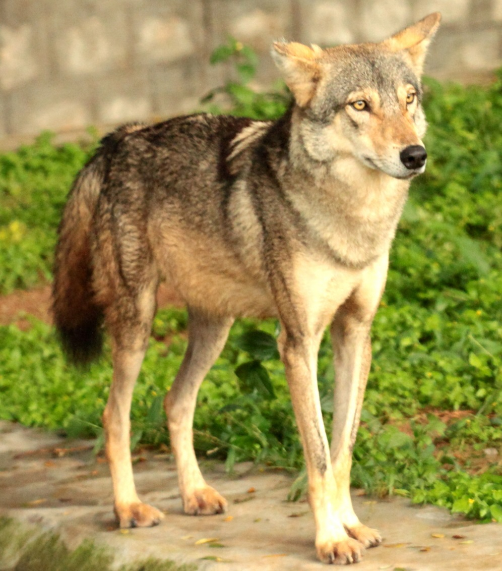 Indian wolf in Mysore zoo